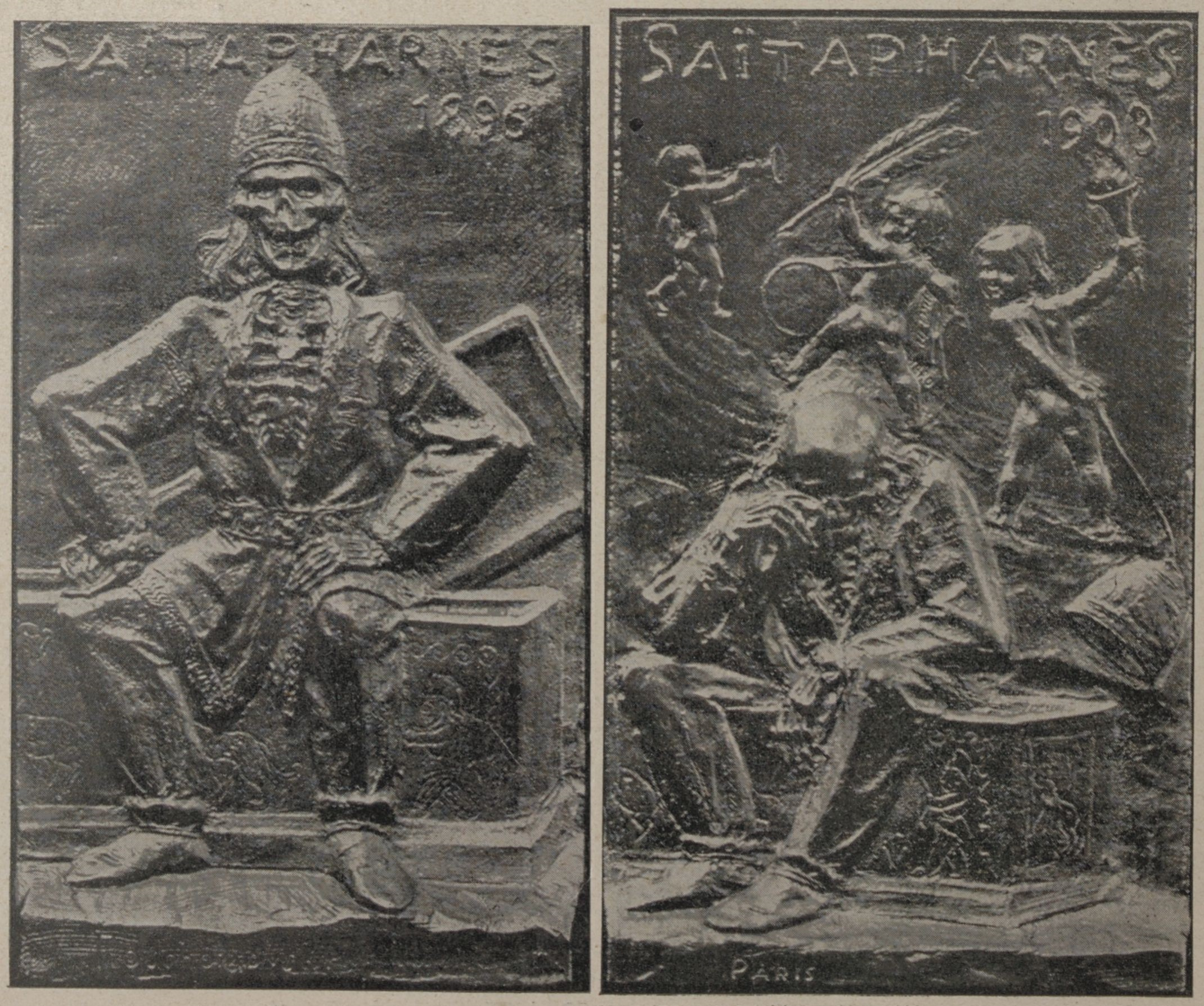 "Les aventures de la tiare de Saïtapharnès, plaquette humoristique ciselée par Roukhomowski, l'auteur de la fausse tiare".